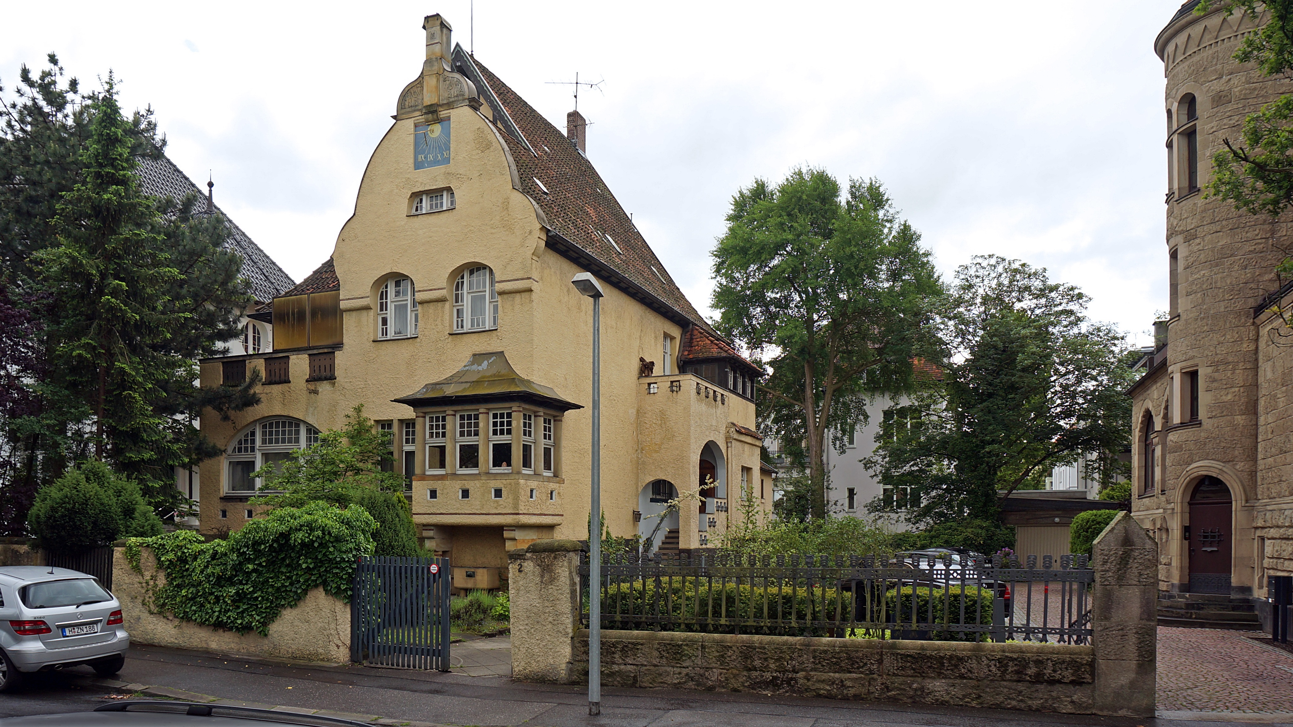 Die 1903 von dem Chemiker, Hochschullehrer und Direktor des Chemischen Instituts der Königlichen Tierarzneischule Hannover Prof. Dr. Carl Arnold als Bauherrn durch den Architekten Karl Siebrecht erbaute "Villa Knusperhäuschen, auch "Haus Arnold" oder "Villa Arnold", wurde seinerzeit in der damaligen Corvinusstraße 2 erbaut. Heute lautet die Adresse Ludwig-Barnay-Straße 2 ...